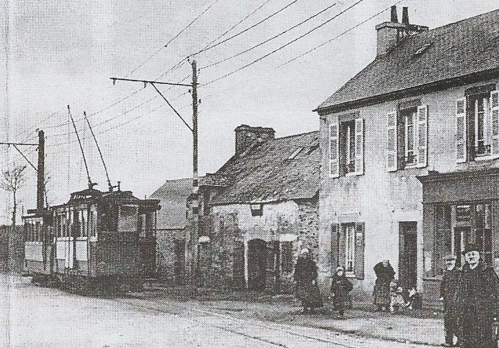 Le tramway entre Brest et Le Conquet : l'arrêt de Pen-ar-Menez (en Locmaria-Plouzané) en 1911